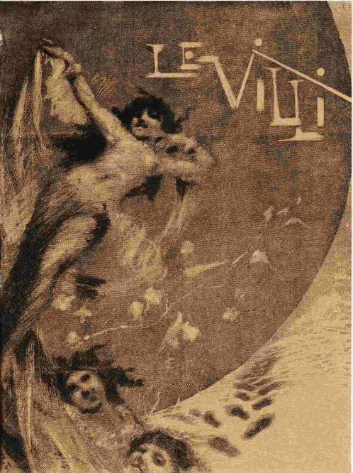 N. Besta, sketch for Giacomo Puccini's Le Villi, published on "Gazzetta Musicale di Milano" (1884)